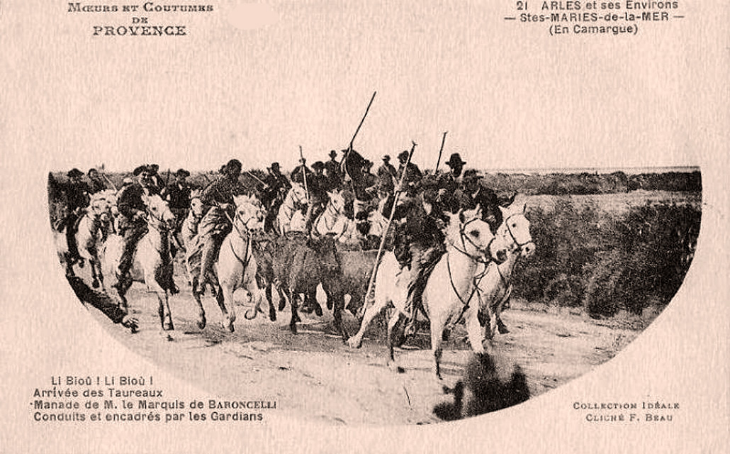 Arrivée à une abrivade de la manade de Folco de Baroncelli-Javon sous la conduite du Marquis